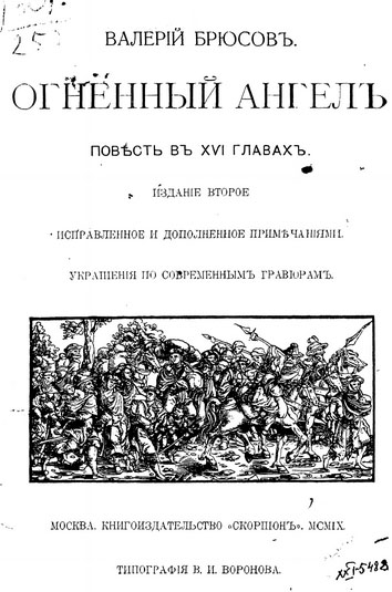 Титульный лист второго издания романа "Огненный ангел"